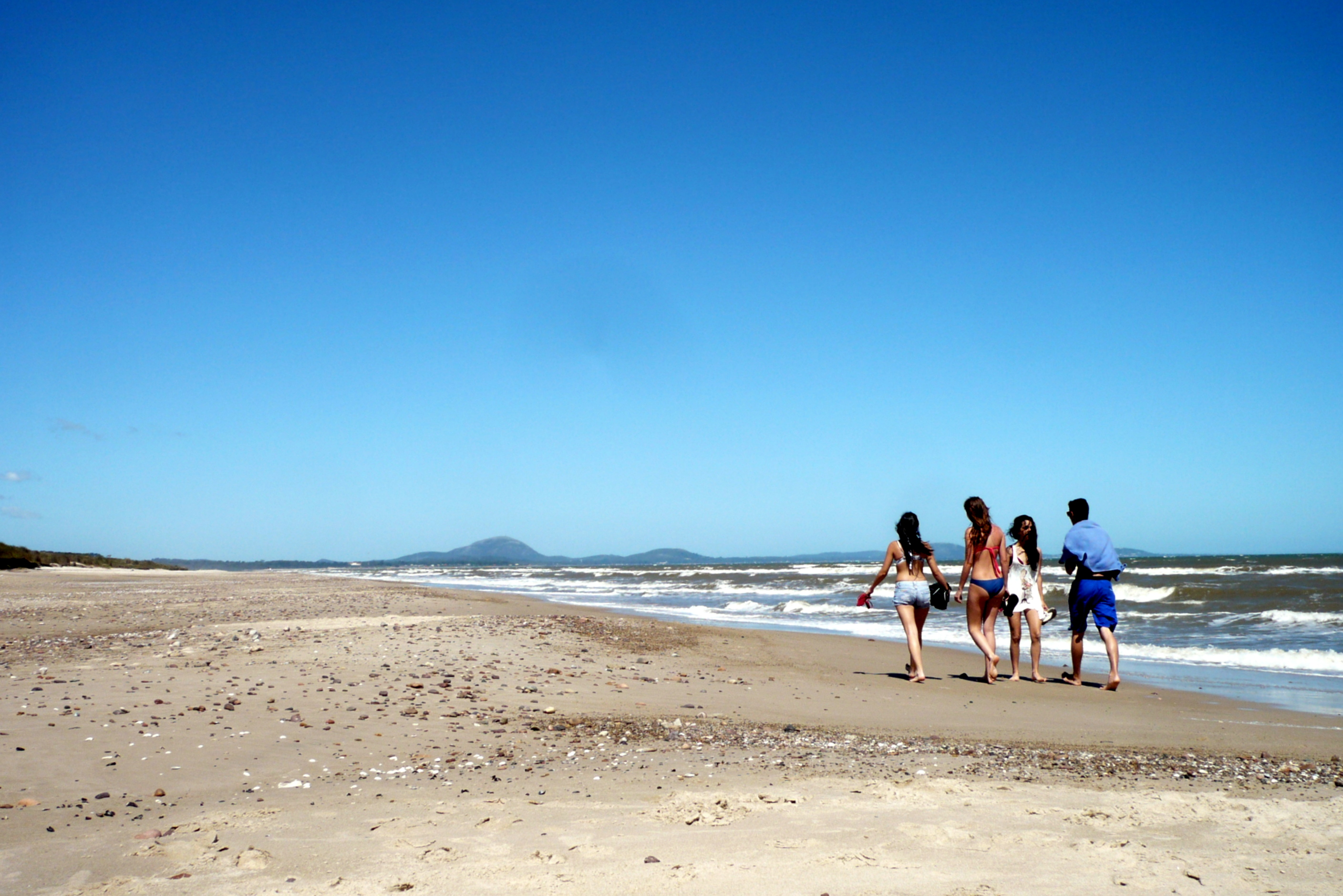 Playa de Santa Ana